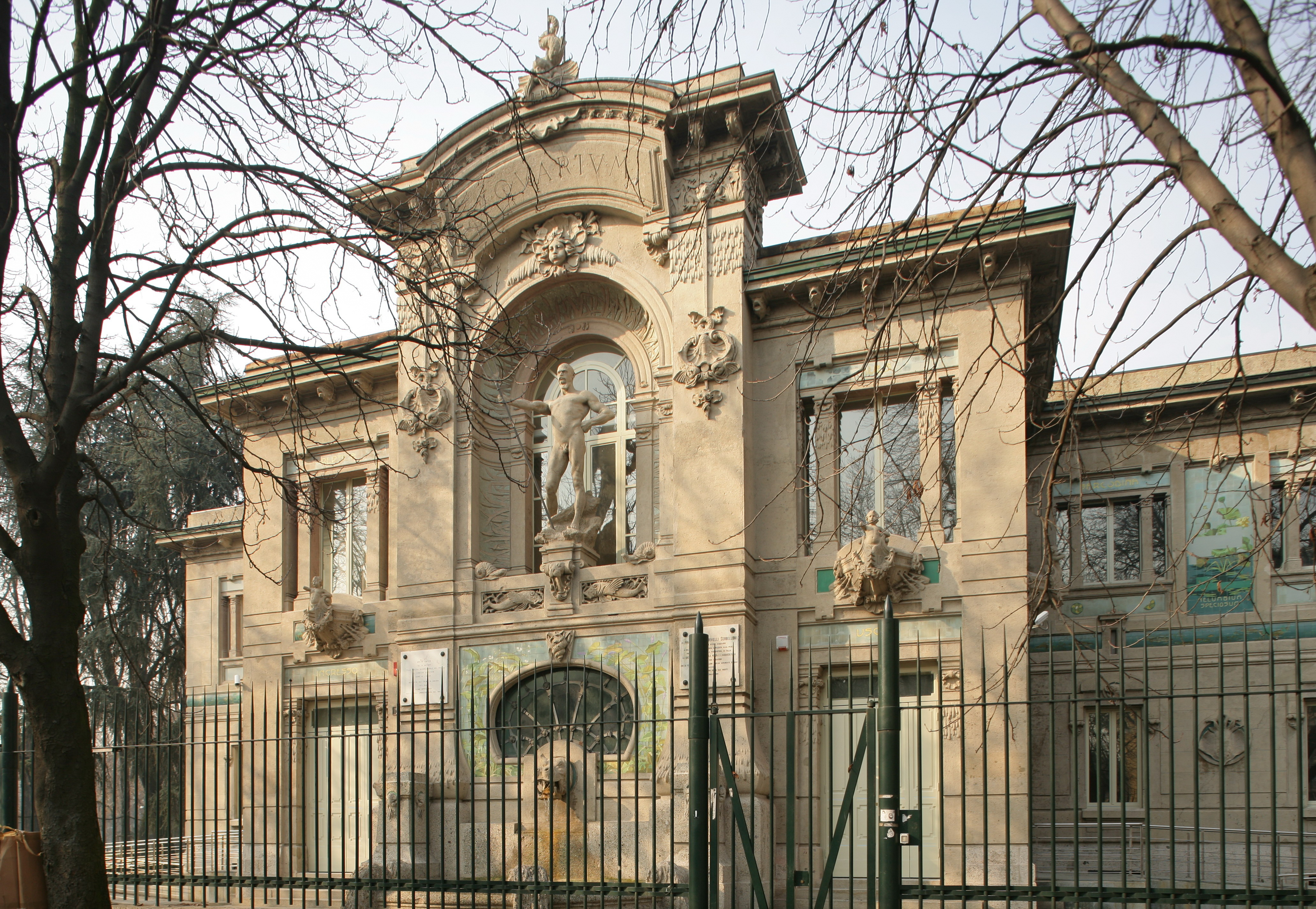 L'Acquario civico di Milano fu costruito in occasione dell'Eposizione mondiale di Milano del 1906 da Sebastiano Giuseppe Locati (1861-1939), e ricostruito dopo le distruzioni della seconda guerra mondiale. La statua di Nettuno sulla facciata è opera di Oreste Labò (1865-1929). Foto di Federico Brunetti.